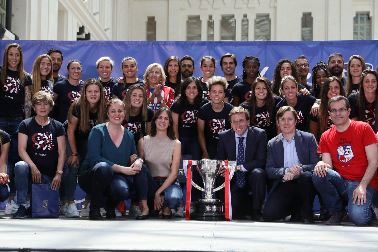 La alcaldesa de Madrid, Manuela Carmena, ha recibido hoy en el Ayuntamiento de Madrid al equipo de fútbol femenino del Atlético de Madrid, campeón de la Liga Iberdrola 2019, en un acto muy emotivo en el que ha felicitado a los integrantes del club y a todas las jugadoras agradeciendo su esfuerzo y la grandeza del logro deportivo. “Habéis ganado la liga. Habéis ganado Madrid. Habéis ganado nuestro corazón, porque os queremos mucho”, subrayó la alcaldesa, que ha recibido una camiseta oficial del equipo homenajeado.